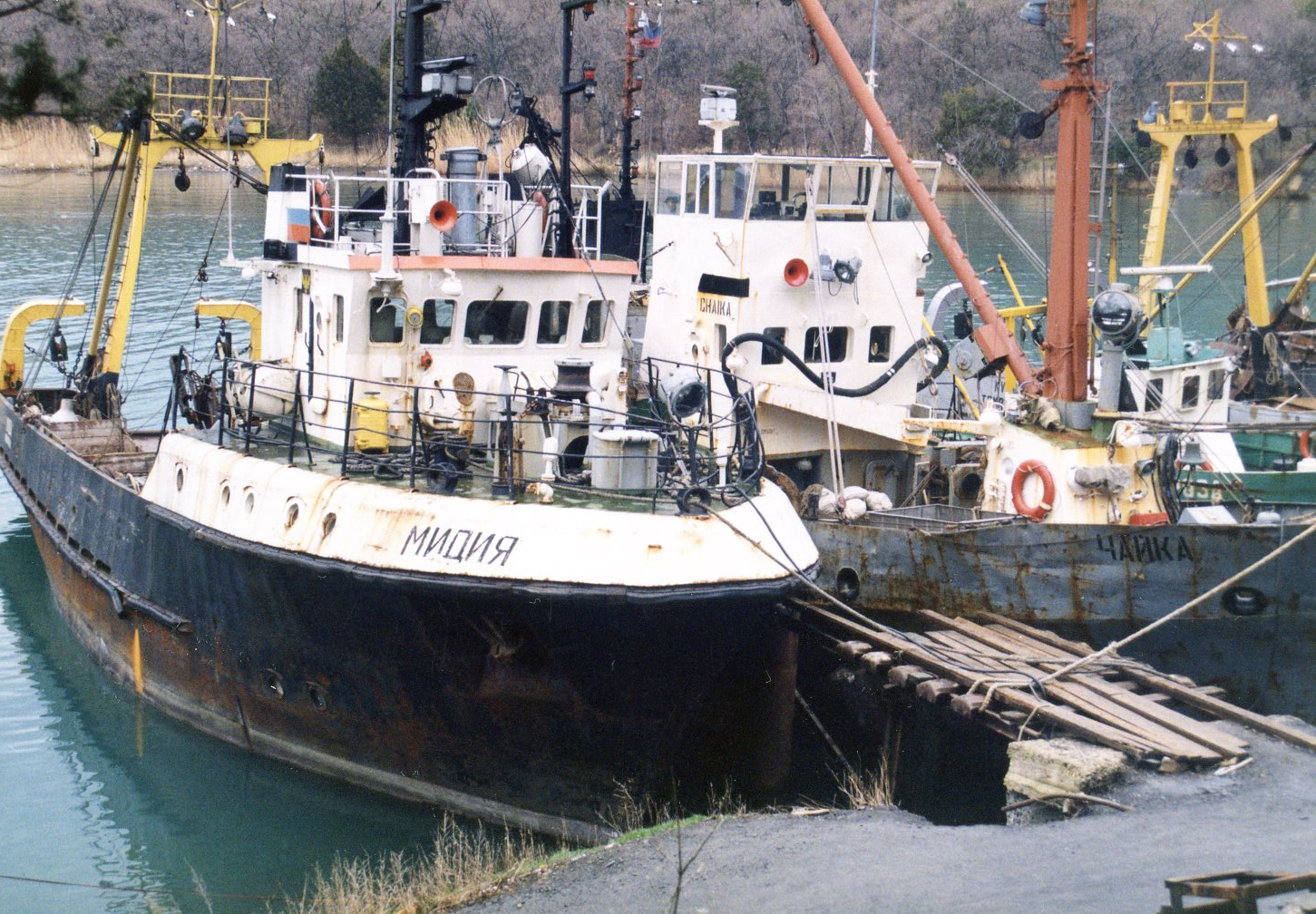 Малый рыболовный траулер (МРТК) Мидия и сейнер Чайка на стоянке в озере Змеином. Поселок Большой Утриш, Анапский район, 1998 год.